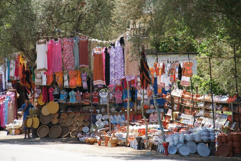 Marchand ambulant de souvenirs en Kabylie.